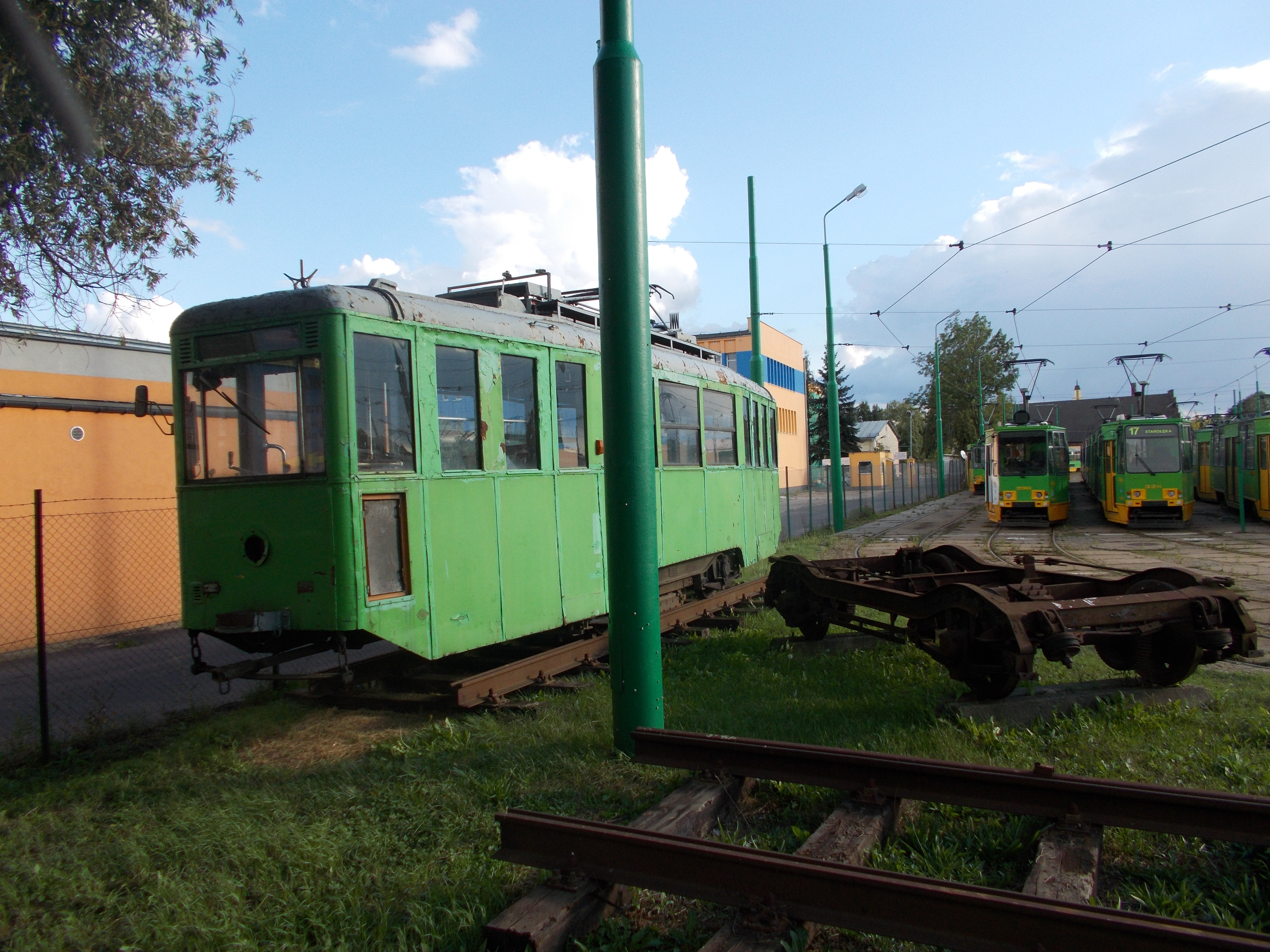 Zajezdnia tramwajowa na ulicy Forteczna w Poznaniu.